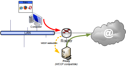 Schéma représentant le fonctionnement typique de WCCP